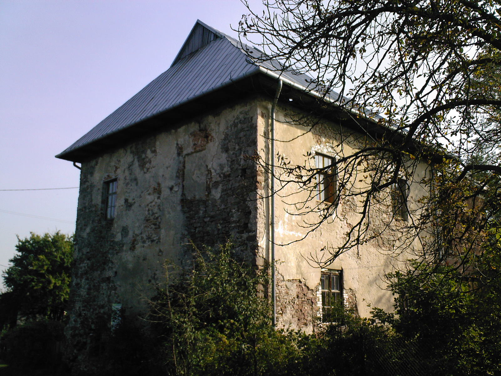 Chełmce - dwór, tzw. zbór ariański (zabytek nr A.463 z 26.10.1956)